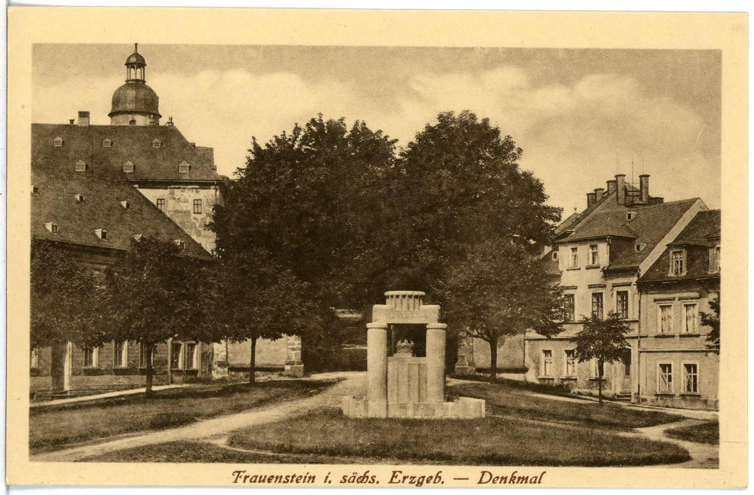 Frauenstein; Denkmal This postcard is from publisher Brück & Sohn in Meißen ( postcard has a unique number 21017 and is available in a higher resolution at the publisher. This images was uploaded in a cooperation project between Wikipedians and the publisher.